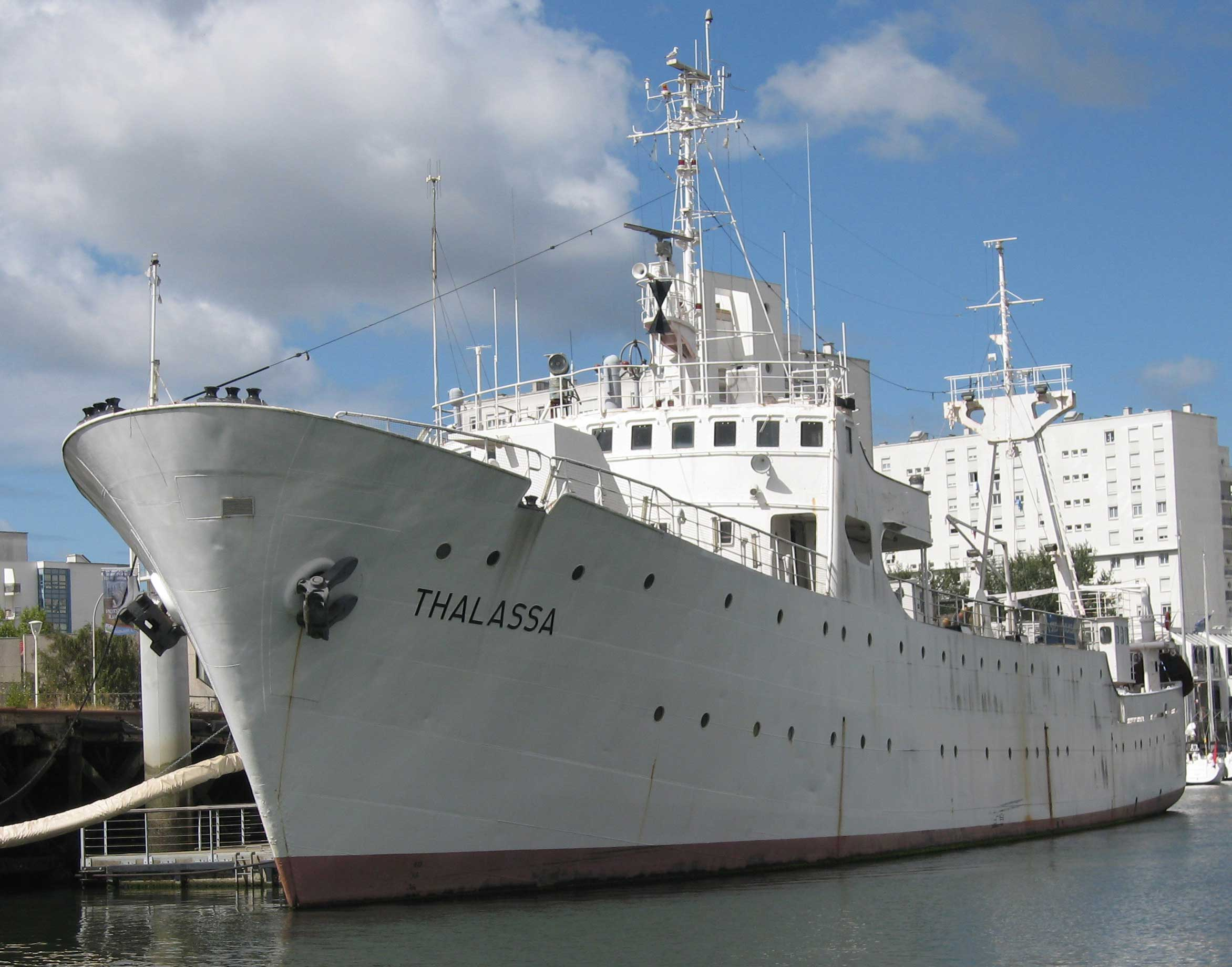 Description : Ancien navire océanographique Thalassa transformé en musée Place : Lorient, Bretagne, France Date : 2006 Auteur : Pline L’IFREMER, Institut Français de recherche pour l’Exploitation de la Mer a lance en 1960 le navire océanographique Thalassa, premier chalutier pêche arrière d'une longueur de 67m. De 1960 à 1996, la Thalassa a effectué de nombreuses campagnes de recherche sur les ressources halieutiques. Son équipage de 50 personnes comprenait 32 membres d’équipage et 18 chercheurs. C'est désormais un navire musée à quai dans le port de Lorient en centre ville